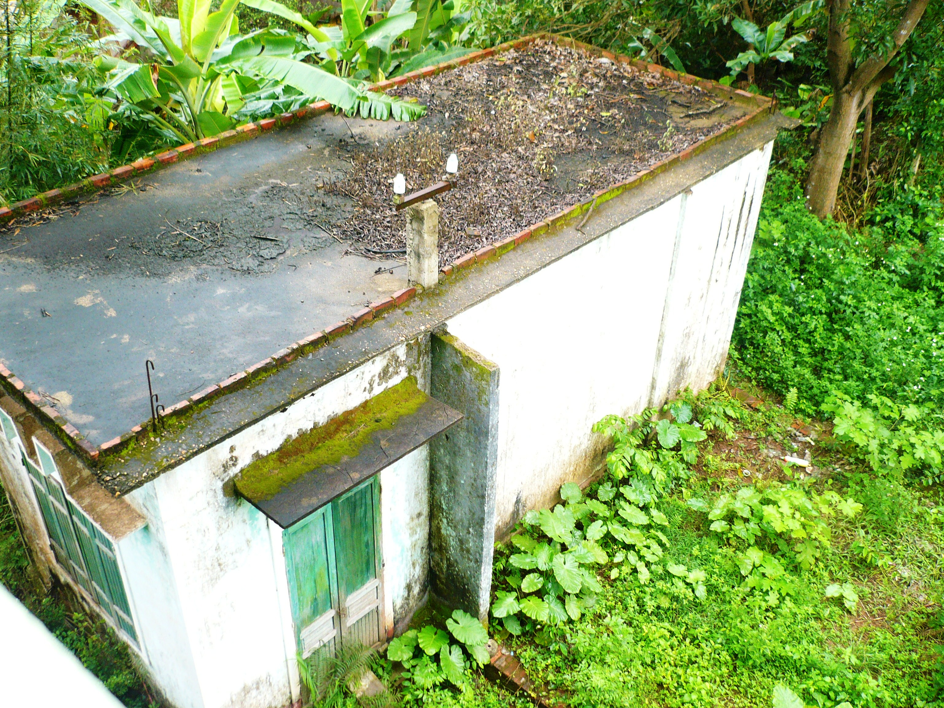 Nhà cũ năm 2010